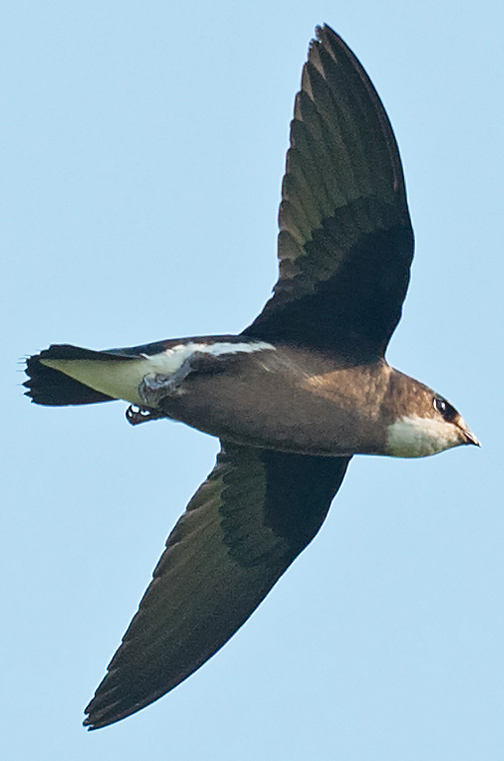 Hunting over Wolotschajewka Perwaja